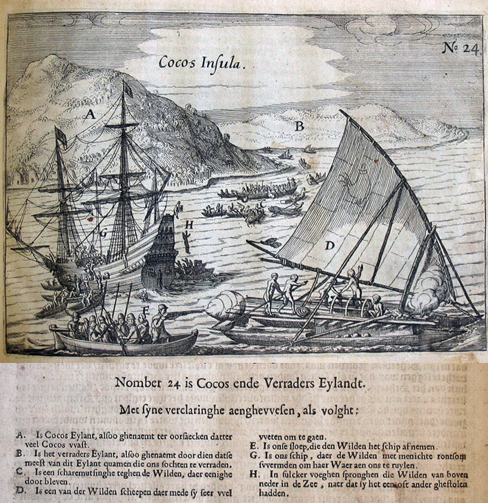 PD wegens ouderdom Bron